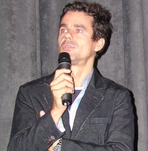 Abgeschnittene Version eines Bildes vom deutschen Regisseur Tom Tykwer, September 2006